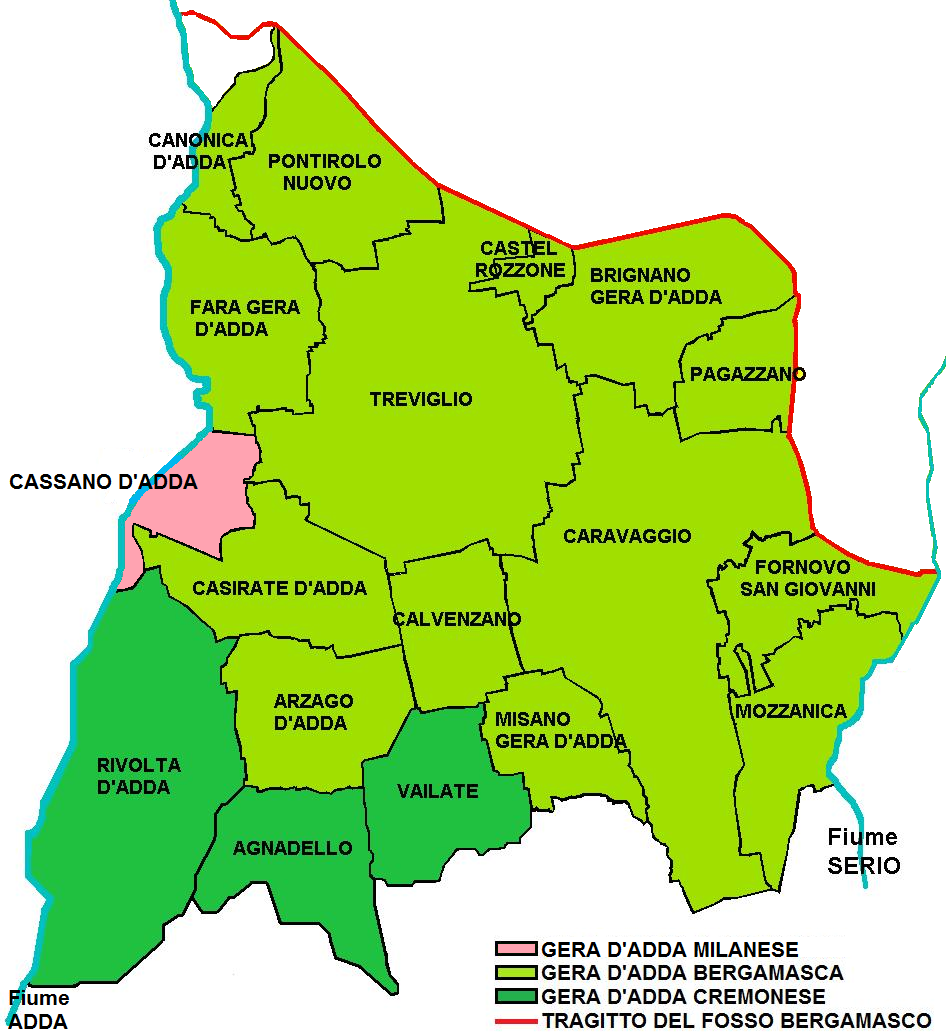 Territori della Gera d'Adda, Province di bergamo e Cremona, Lombardia, Italy